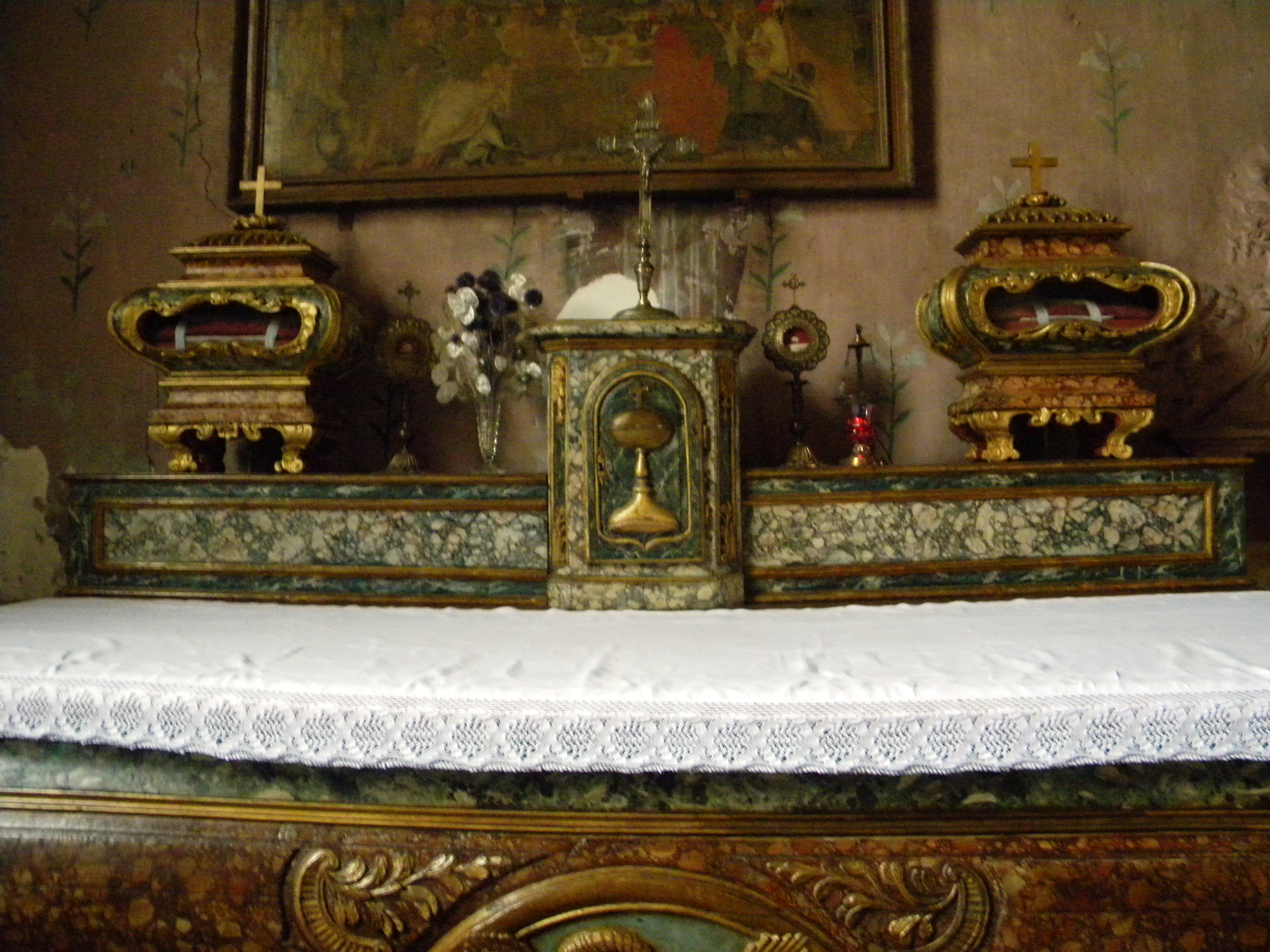 Reliquaire de saint Fidel et saint Clément 1757 Corcelles-les-Arts